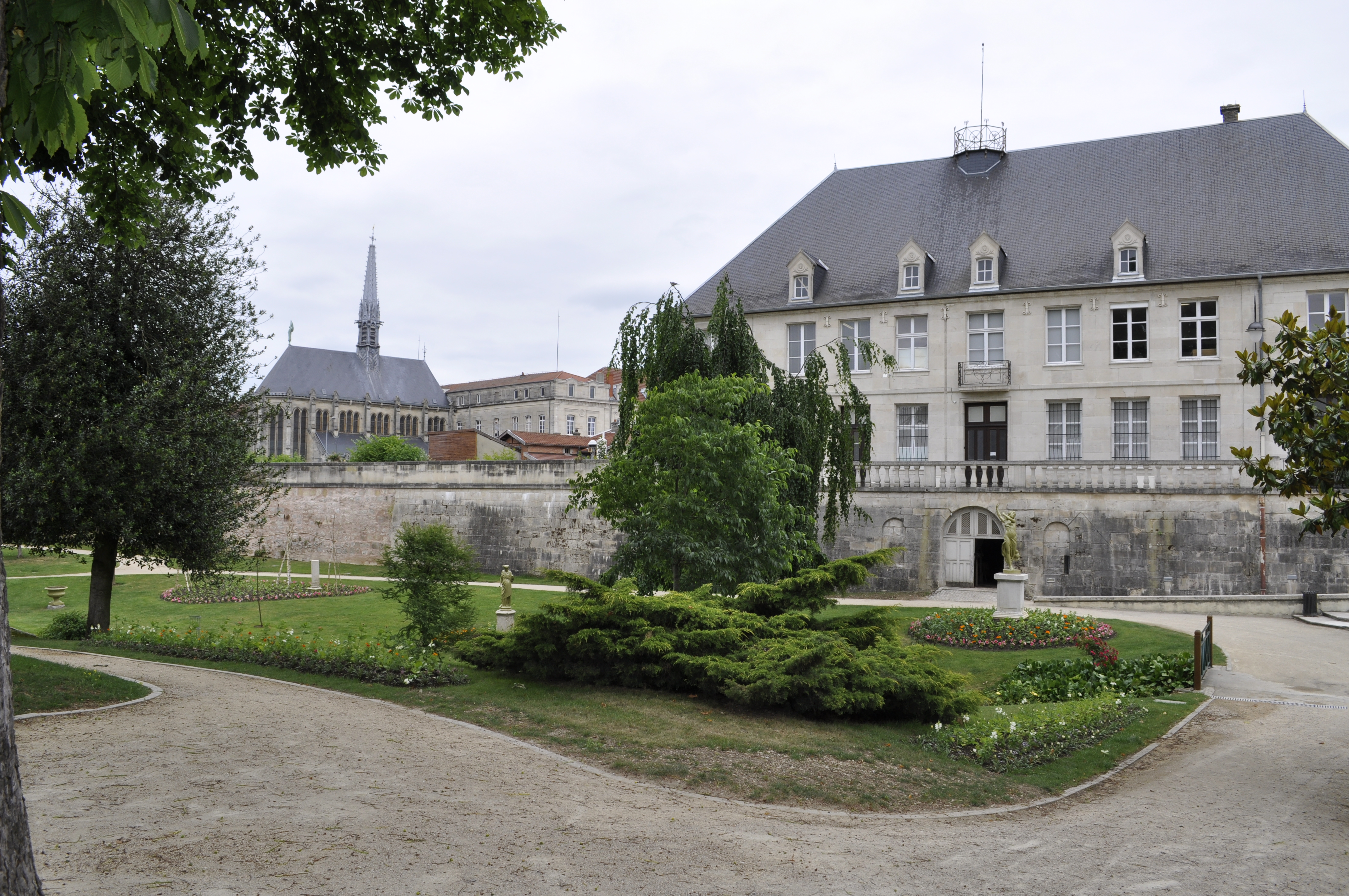 Saint Dizier. Parc derrière la mairie, musée municipal.